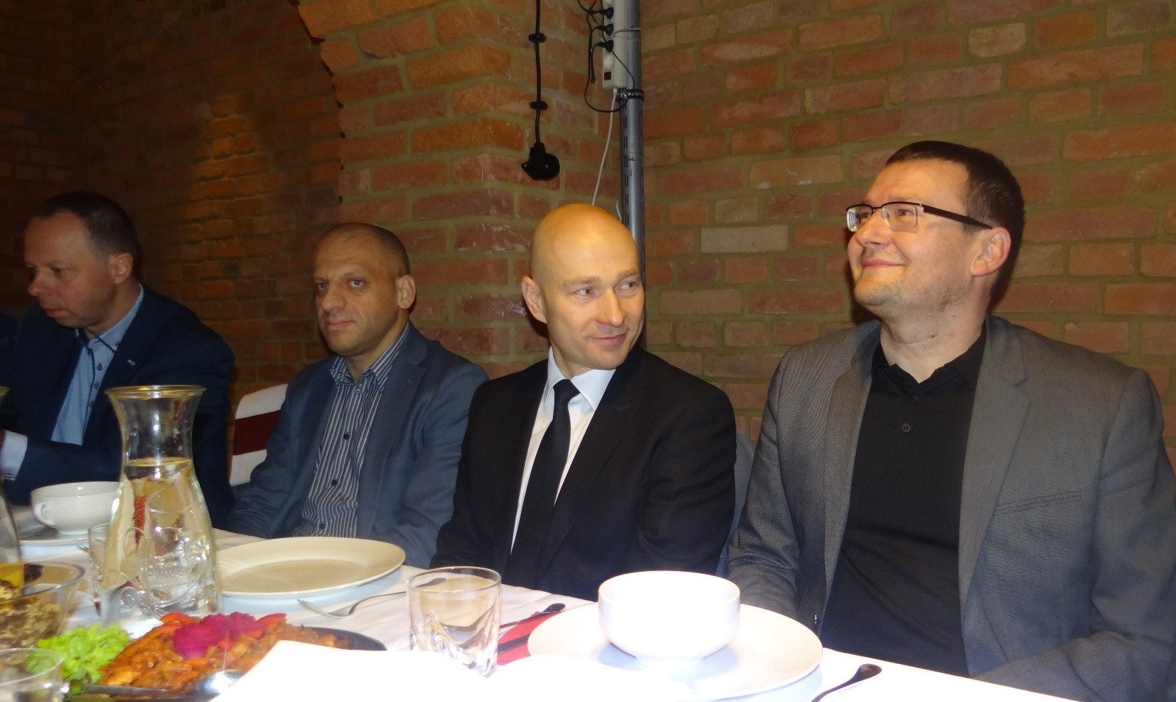 Prezes Spójni z prezydentem Stargardu podczas wgili (20.21.2018)